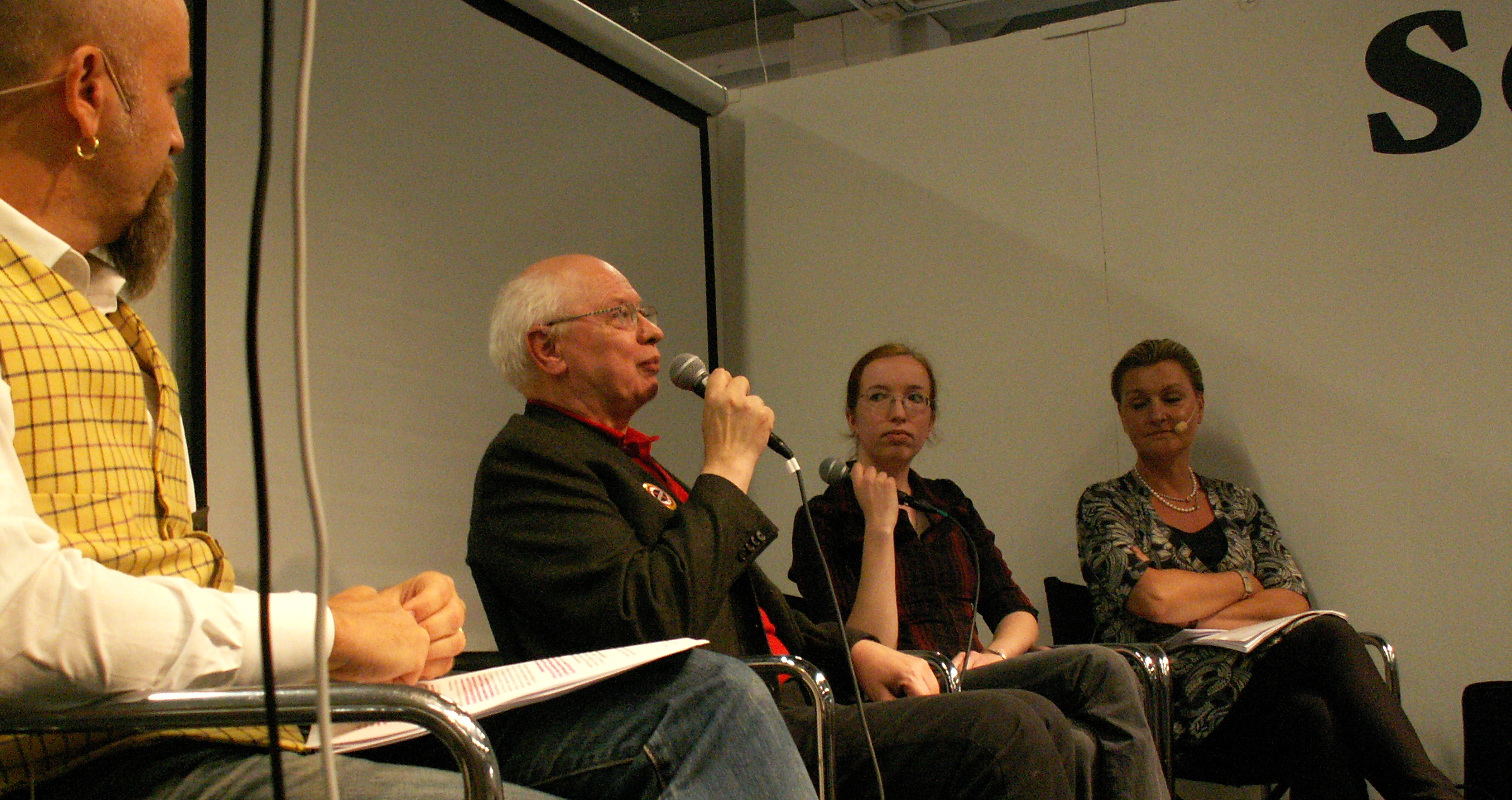 "Censurdebatt: Var går gränsen mellan konst och pornografi?" på Bokmässan 2011. Samtal om censur med seriefrämjaren Magnus Knutsson, serieskaparen Tinet Elmgren och riksdagskvinnan Maria Abrahamsson. Moderator: Fredrik Strömberg